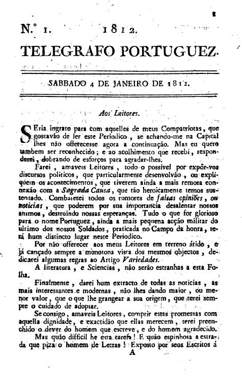 Fac-simile do periódico "Telegrafo Portugues" de 4 jan 1812.